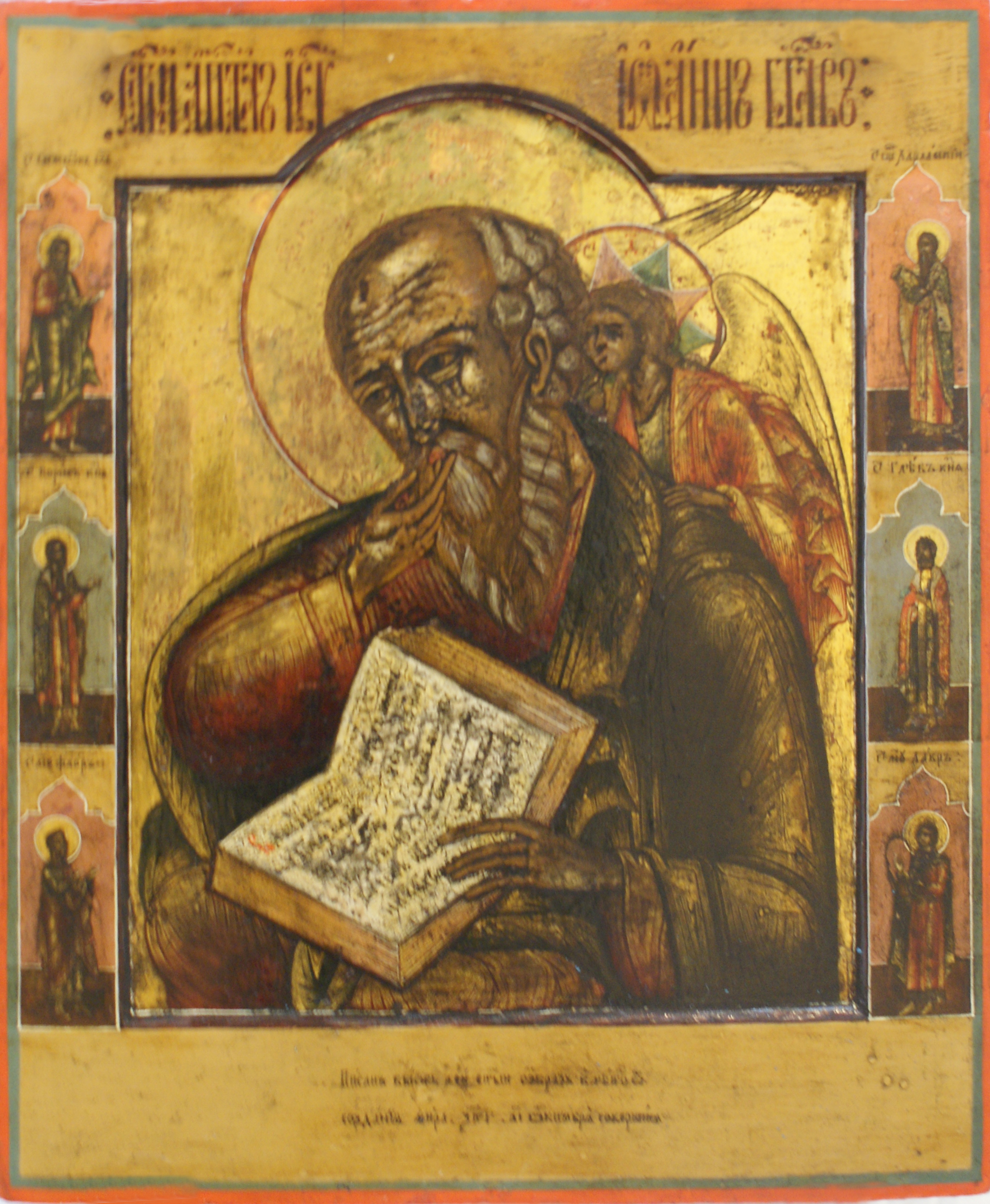 Абраз "Ян Багаслоў у маўчанні" Расія, дрэва, ляўкас, тэмпера